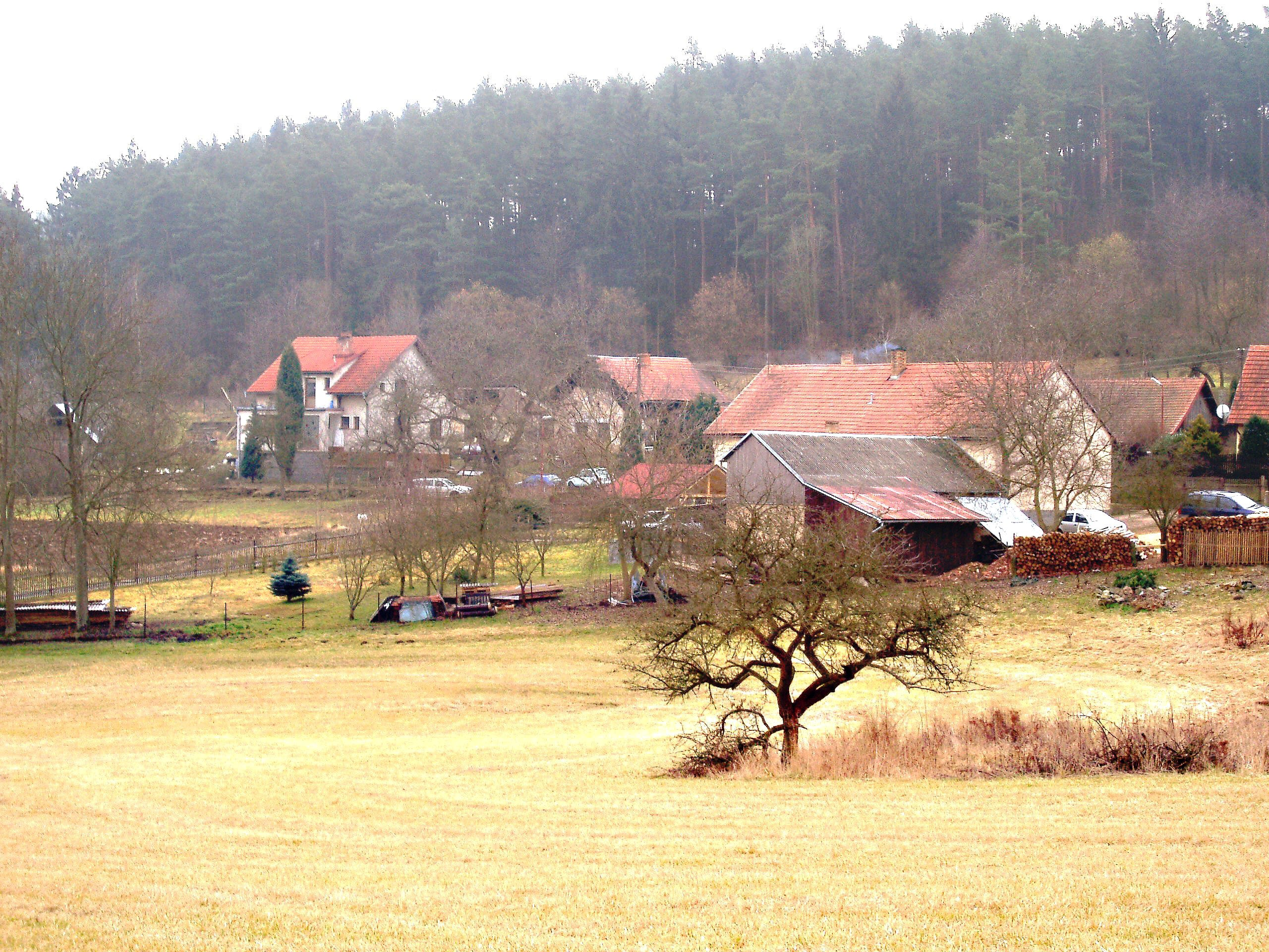 Kaliště u Dolních Hbit